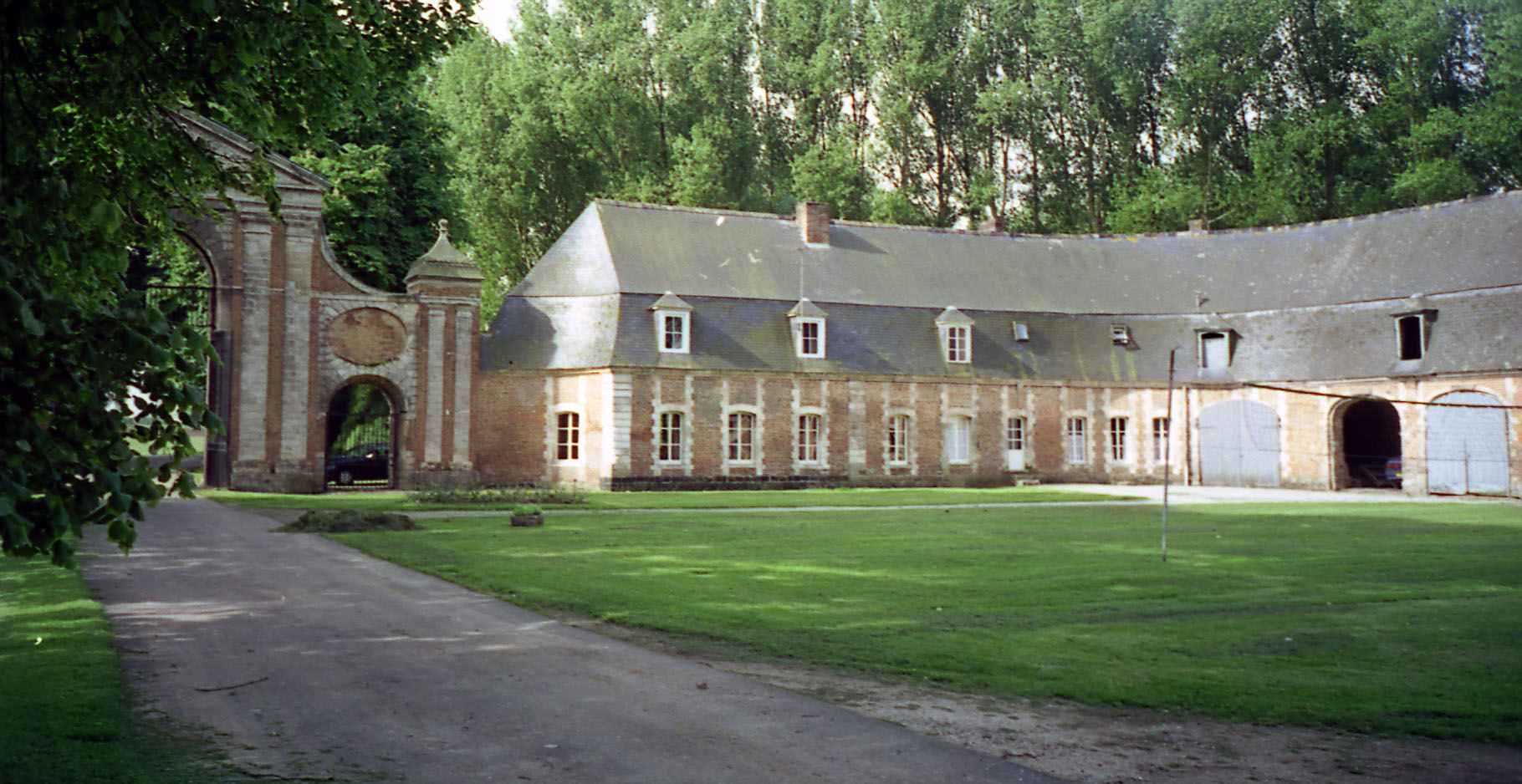 L'abbaye Saint André à gouy St André